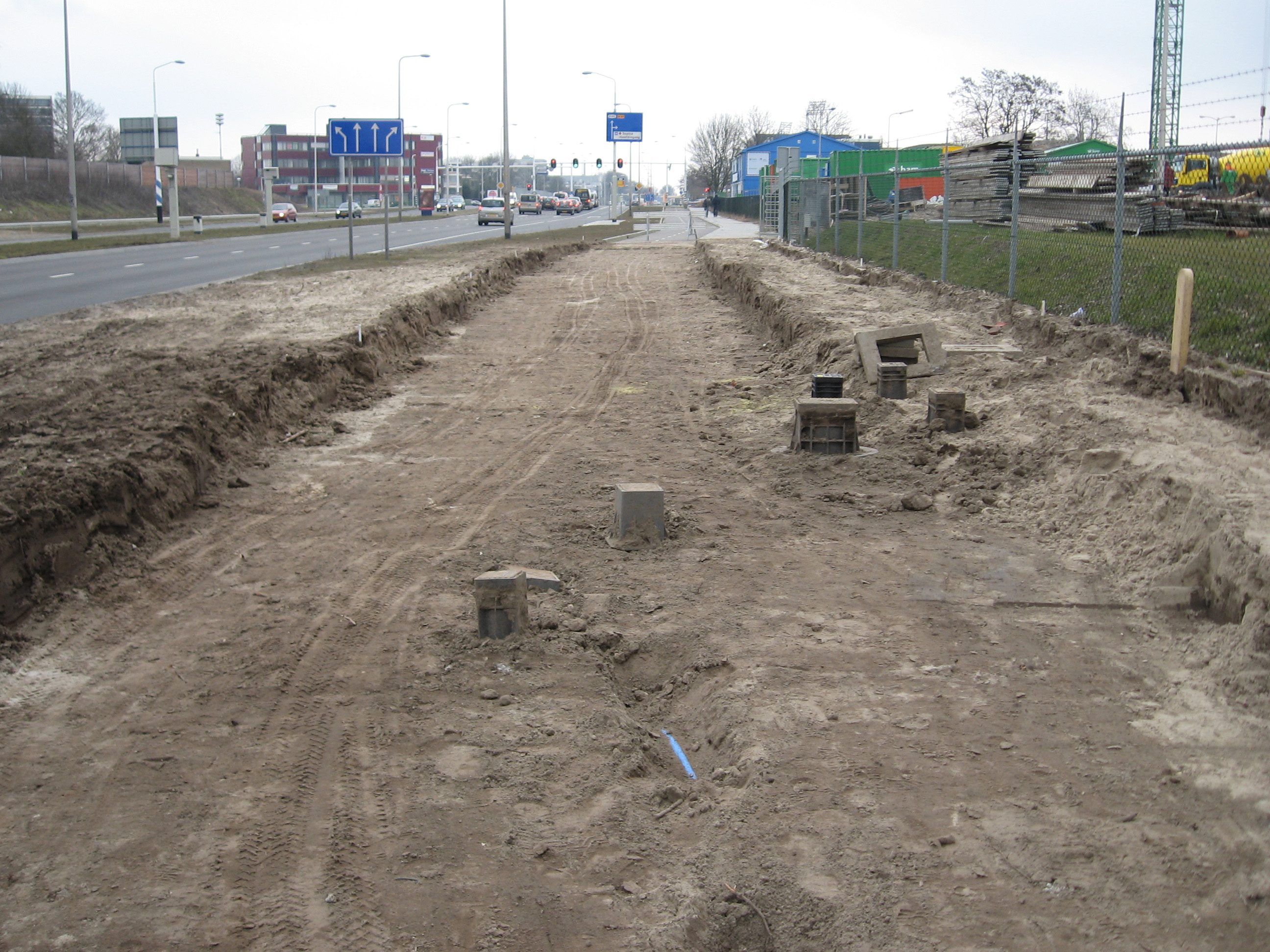 Een ontgraven cunet in Zwolle ten behoeve van een aan te leggen fietspad met trottoir. De potten die in het cunet staan zijn o.a. brandkranen.